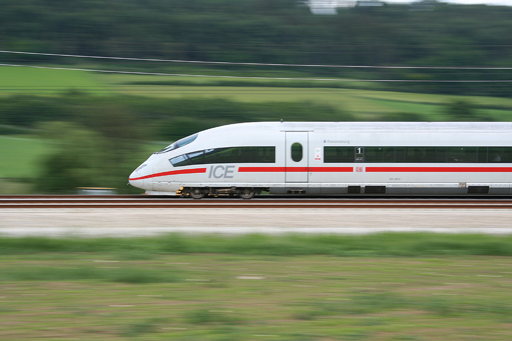 Mitzieher eines ICE 3 auf der Neubaustrecke Ingolstadt–Nürnberg.